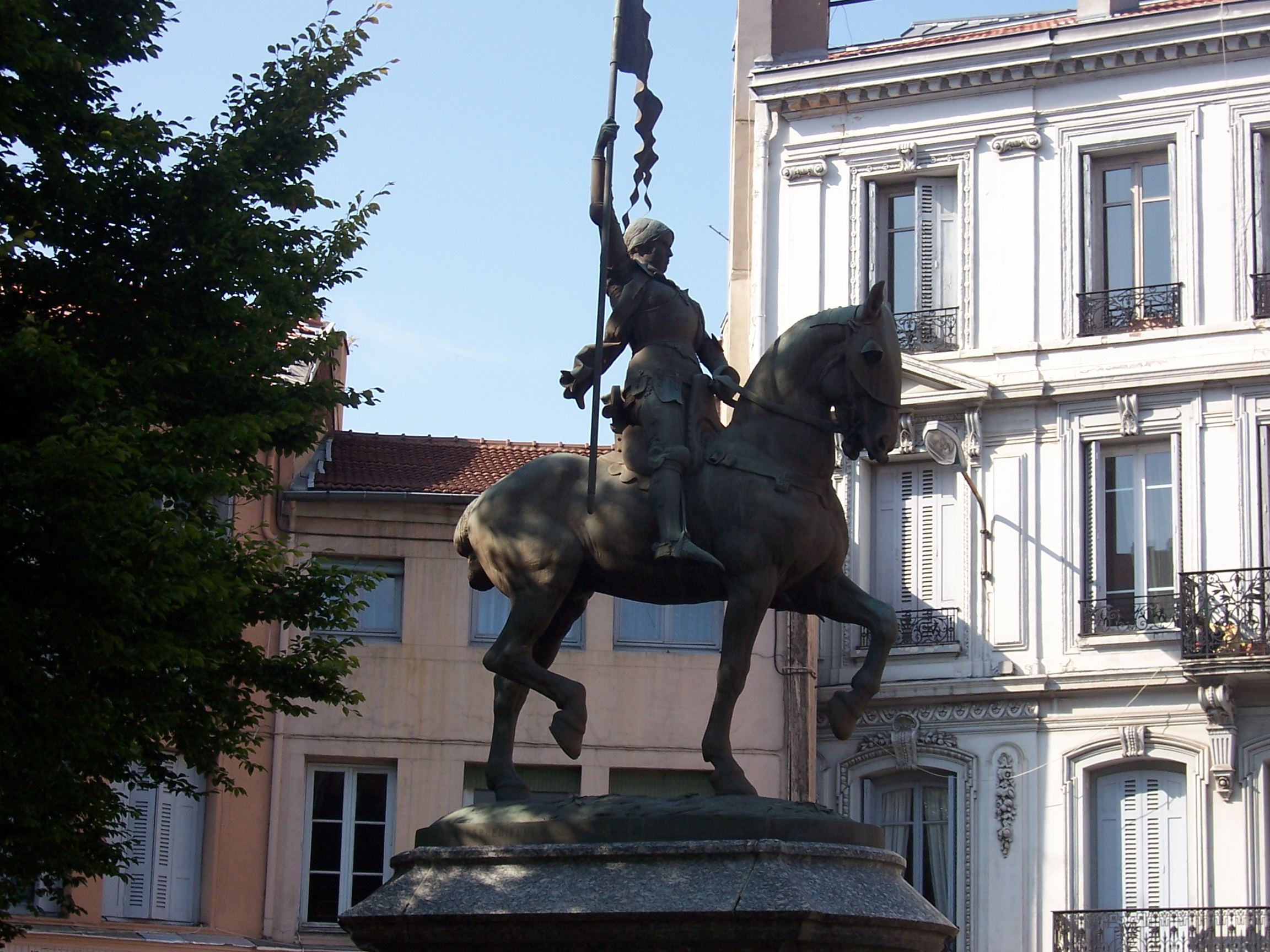 Statue de Jeanne d'Arc inaugurée le 4 juin 1916 par Paul Petit. Nous la devons à l'artiste Emmanuel Fremiet